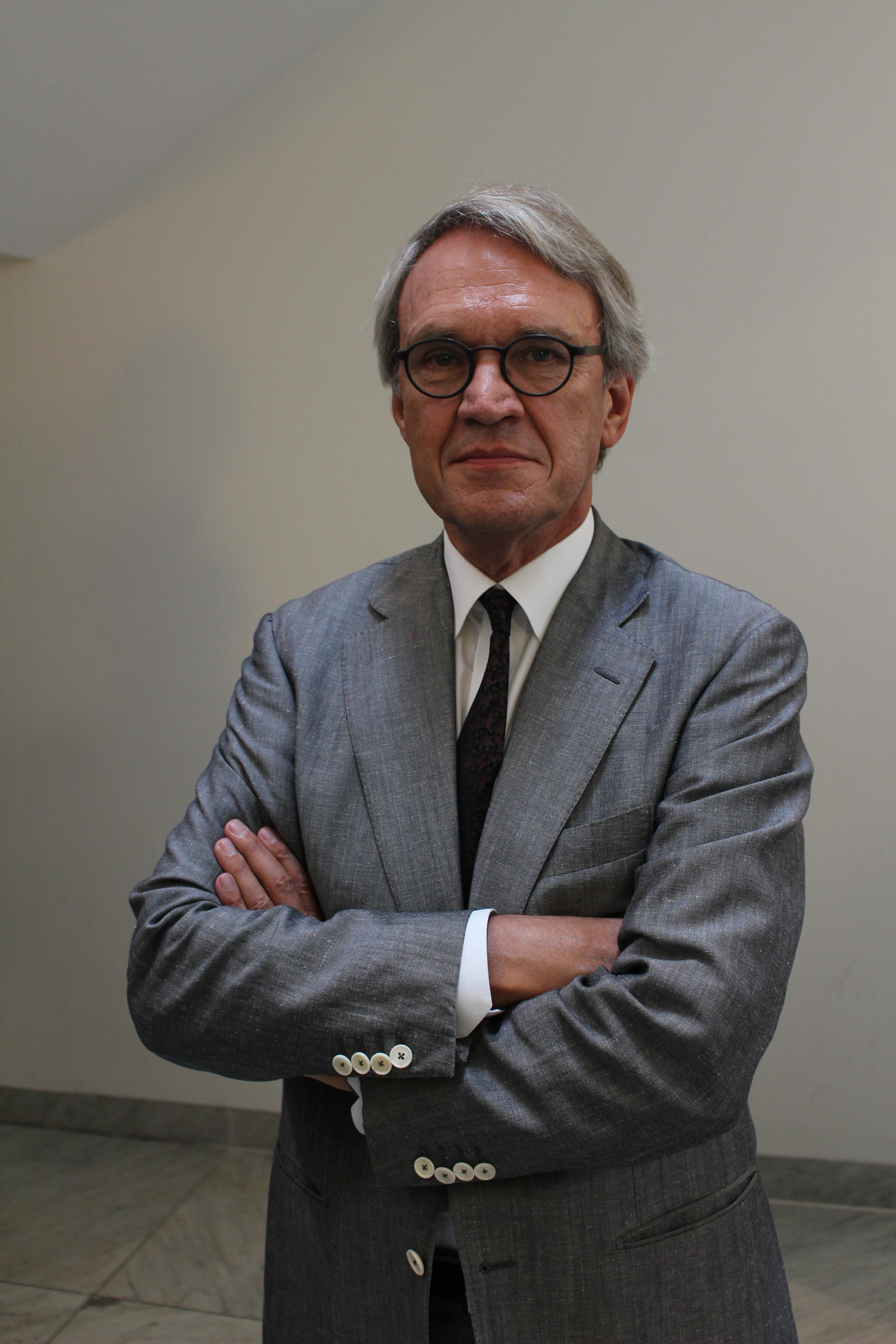 Cees Renckens